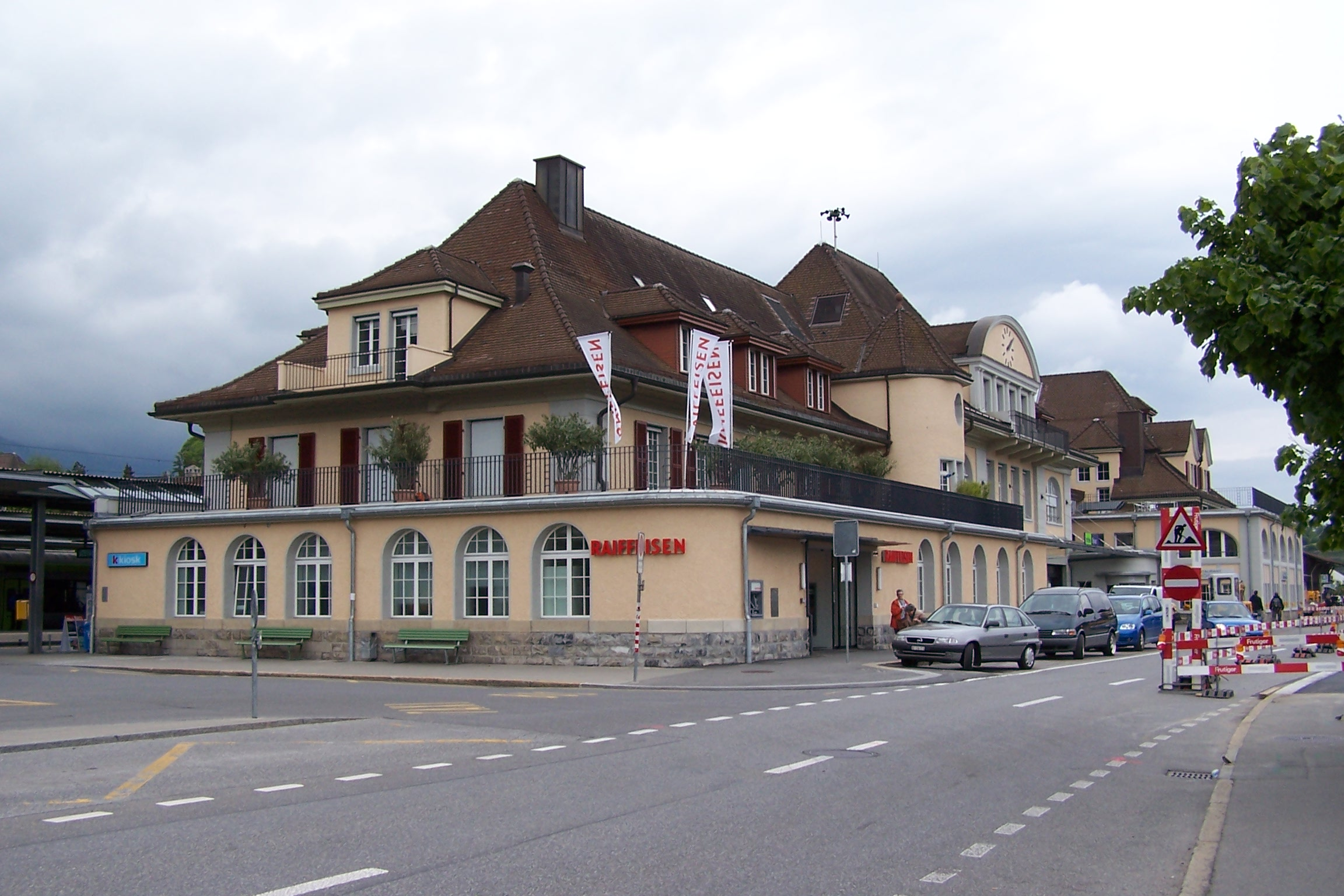 Bahnhofsgebäude von Spiez